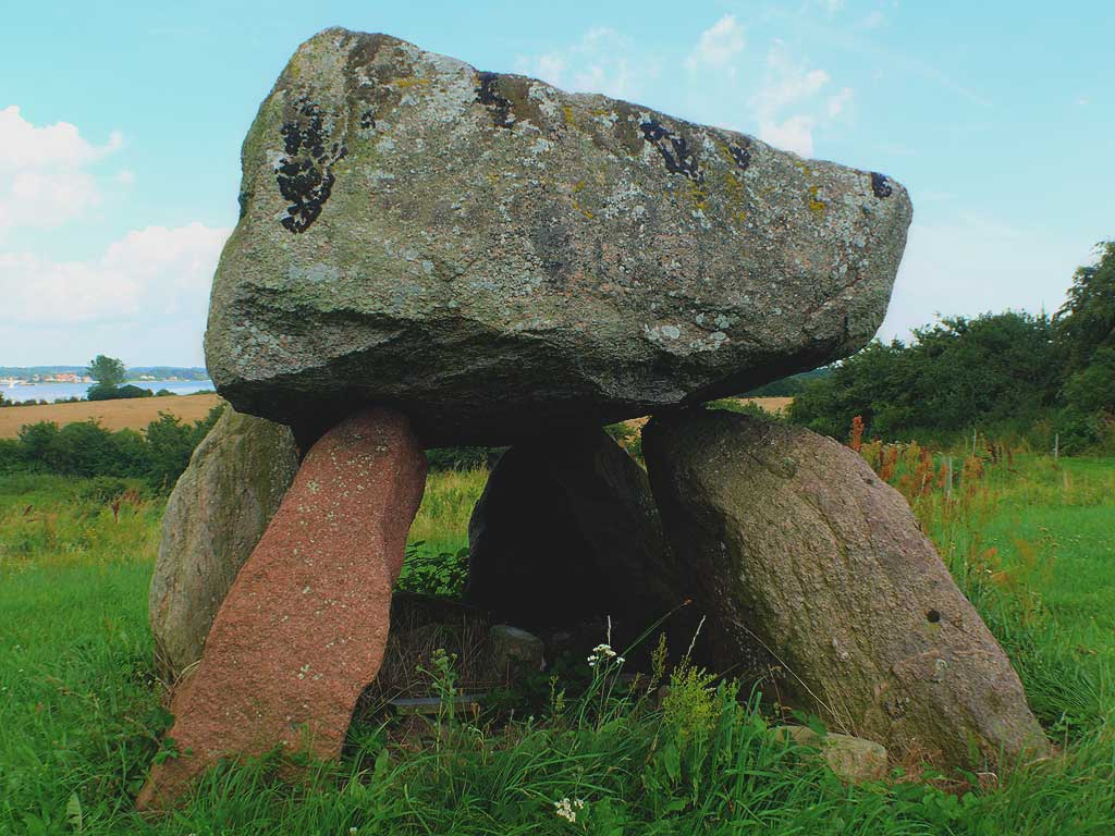 Bjerne